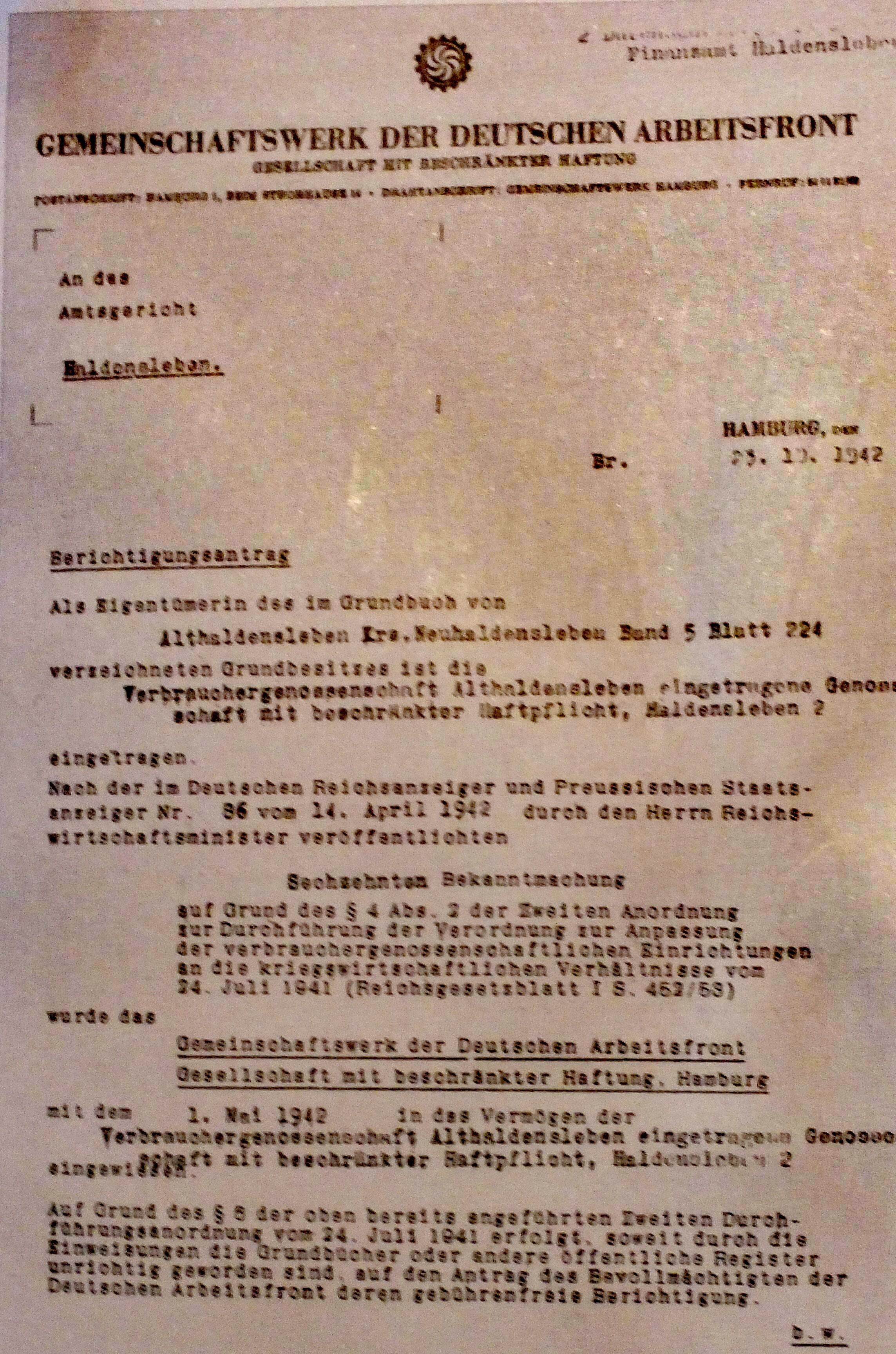 Bescheid über die Vermögensübertragung des früheren Konsum-Vereins Haldesleben 1942 auf das Gemeinschaftswerk der DAF in Hamburg